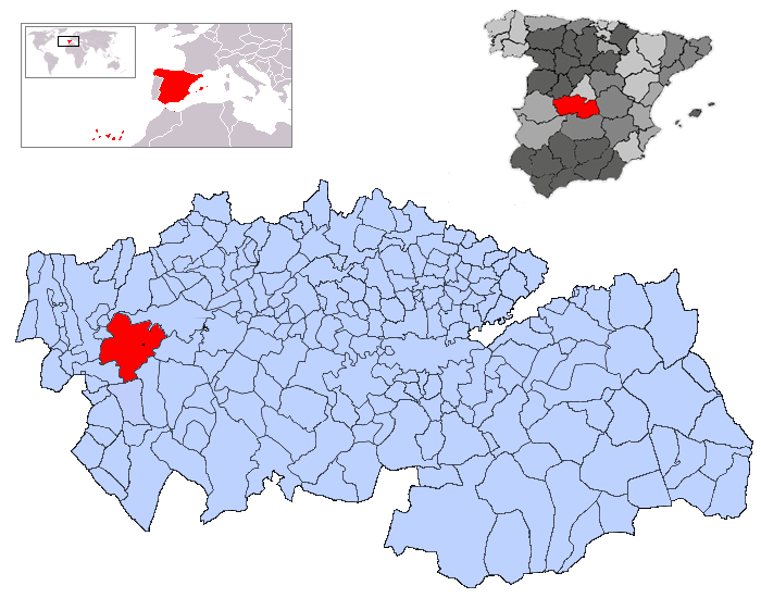 Calera y Chozas en la provincia de Toledo